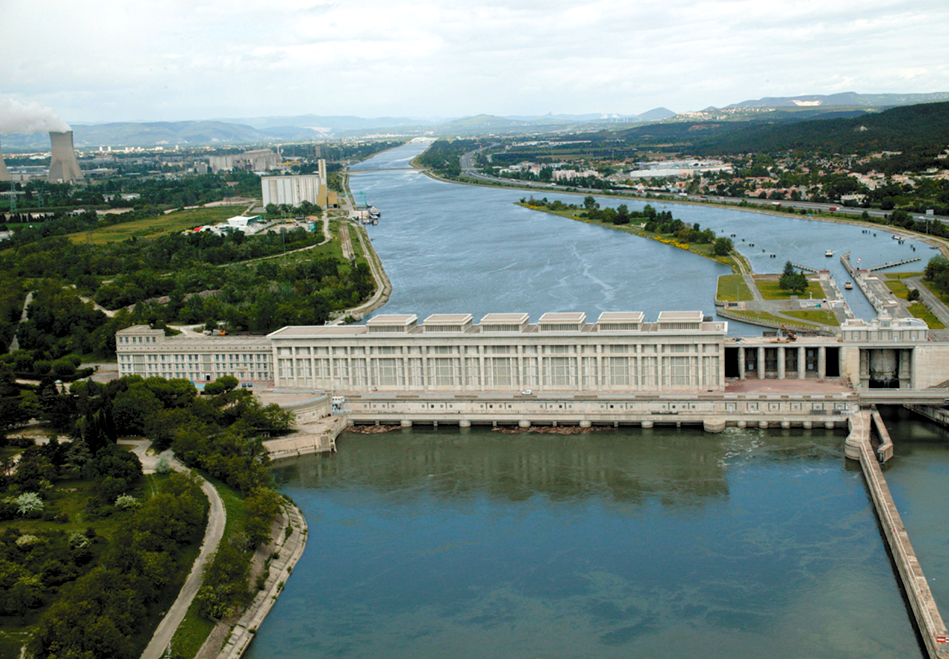 Barrage Donzère-Mondragon Bollène vue aérienne